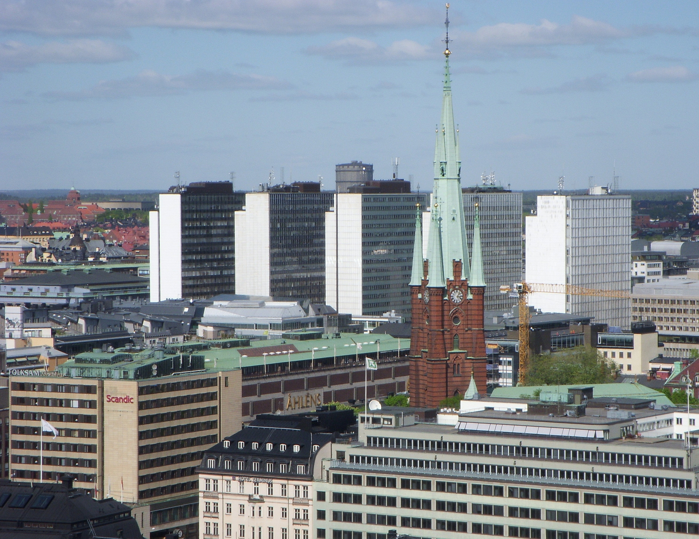 Klarakvarteren från Stadshustornet i Stockholm